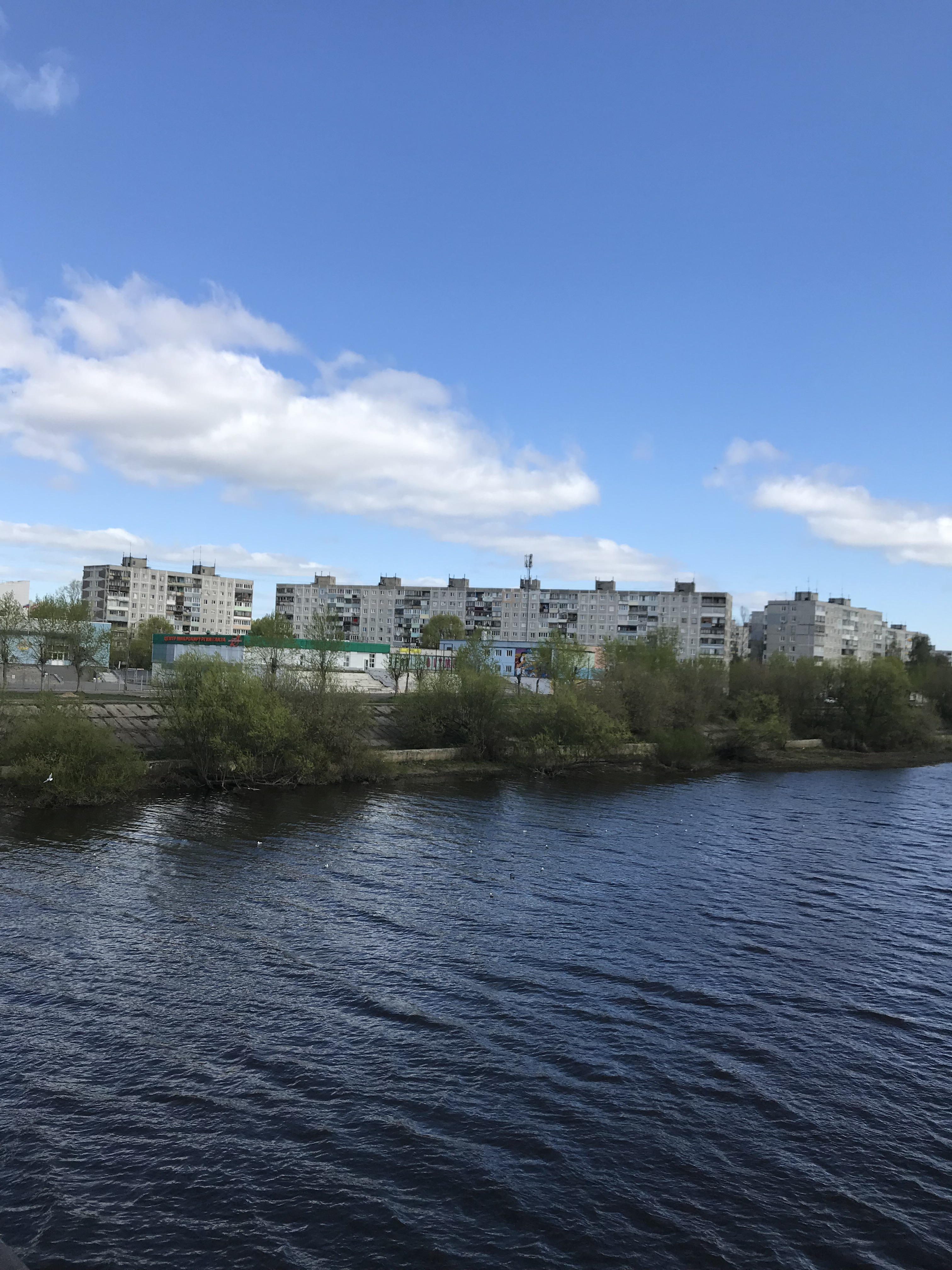 Река течёт в городе Орехово-Зуево